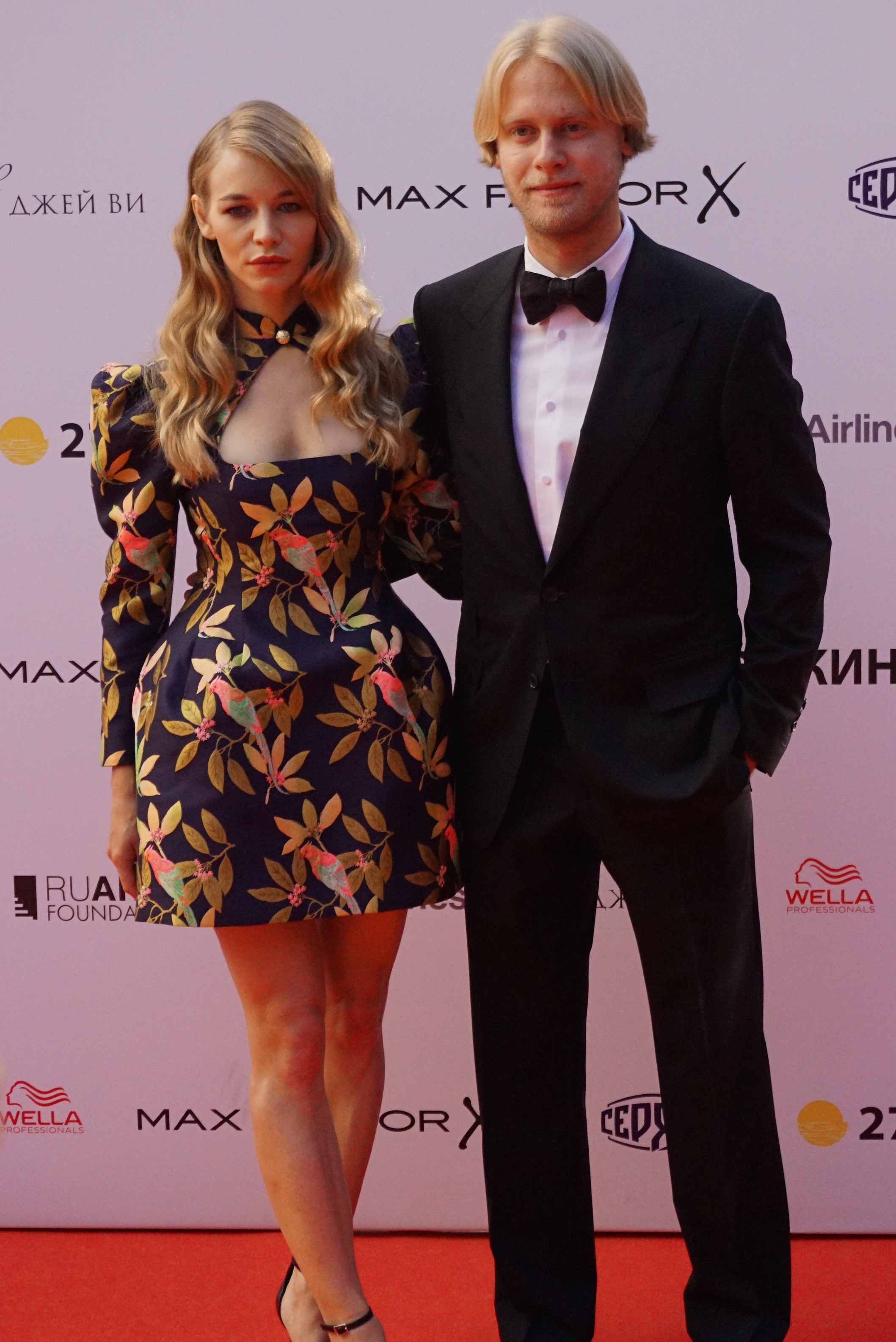 Светлана Владимировна Устинова (род. 1 мая 1982, Северодвинск) российская киноактриса и продюсер Илья Стюарт на кинофестивале Кинотавр. Сочи, 2016.